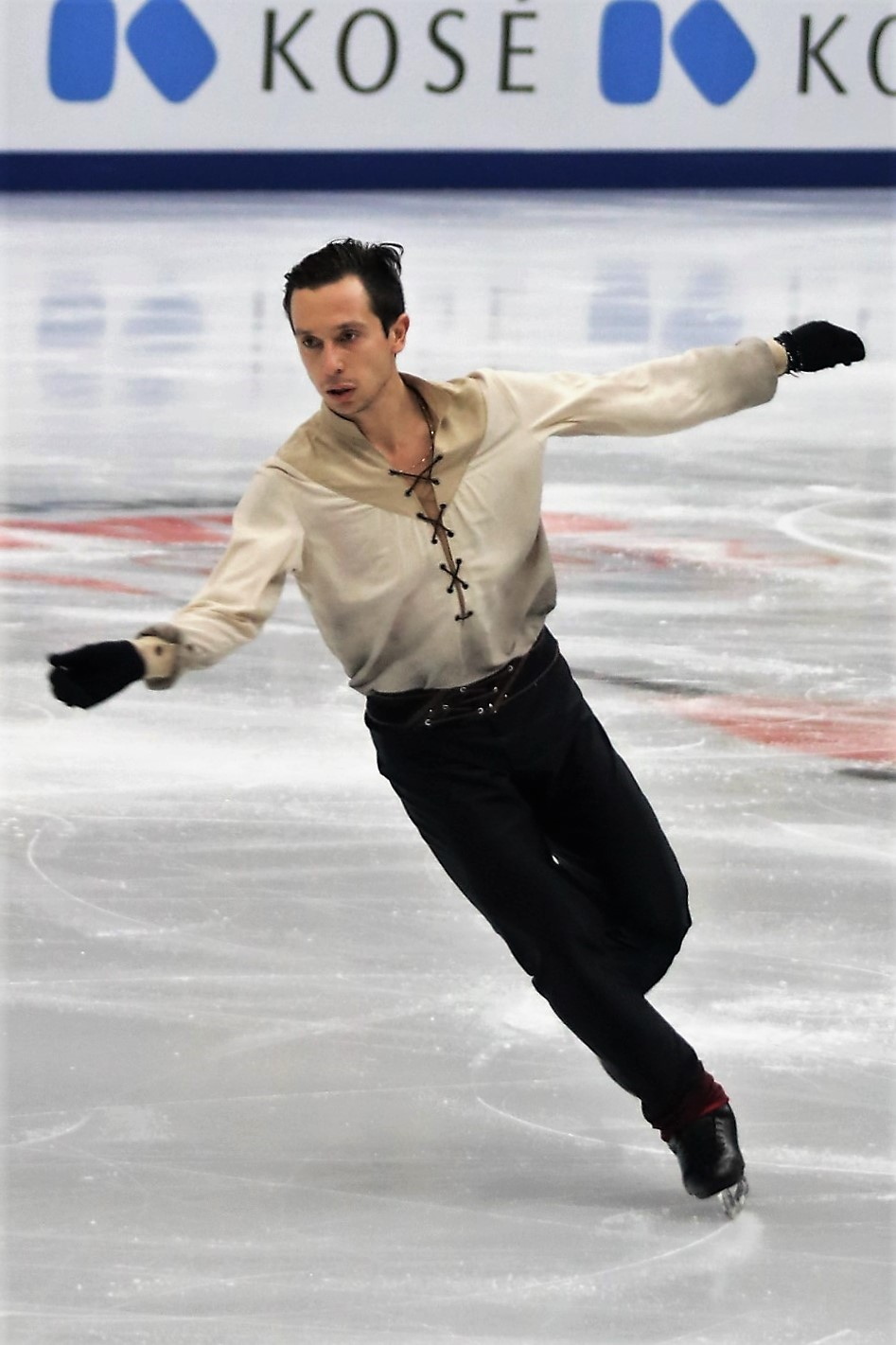 Алексей Быченко (Израиль) на Чемпионате Европы по фигурному катанию 2018.